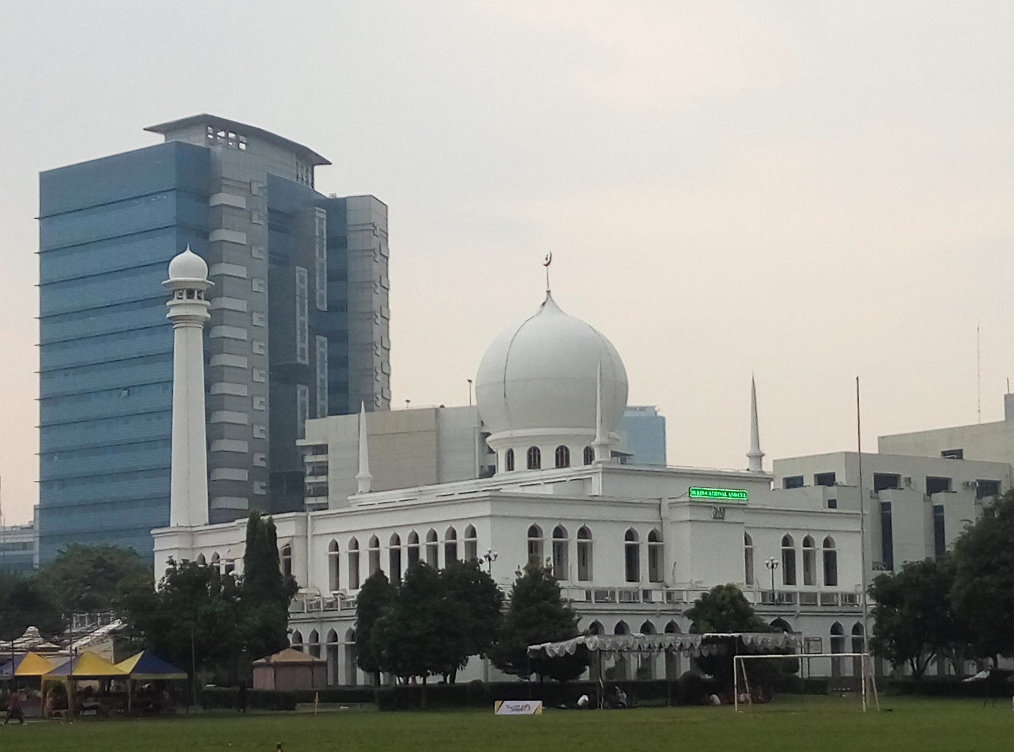 Masjid Agung Al-Azhar, Jakarta Selatan